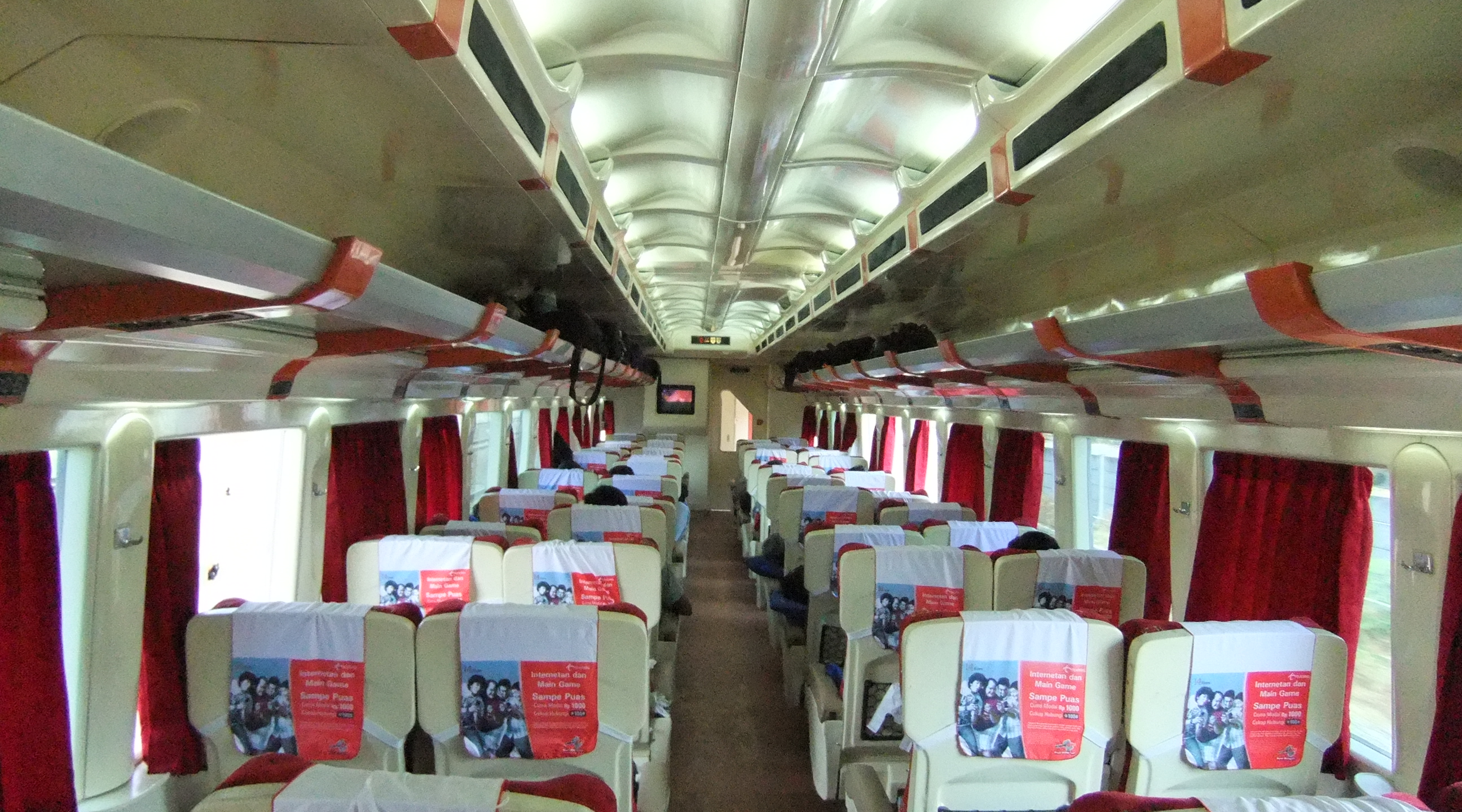 Interior Kereta Api Argo Bromo Siang